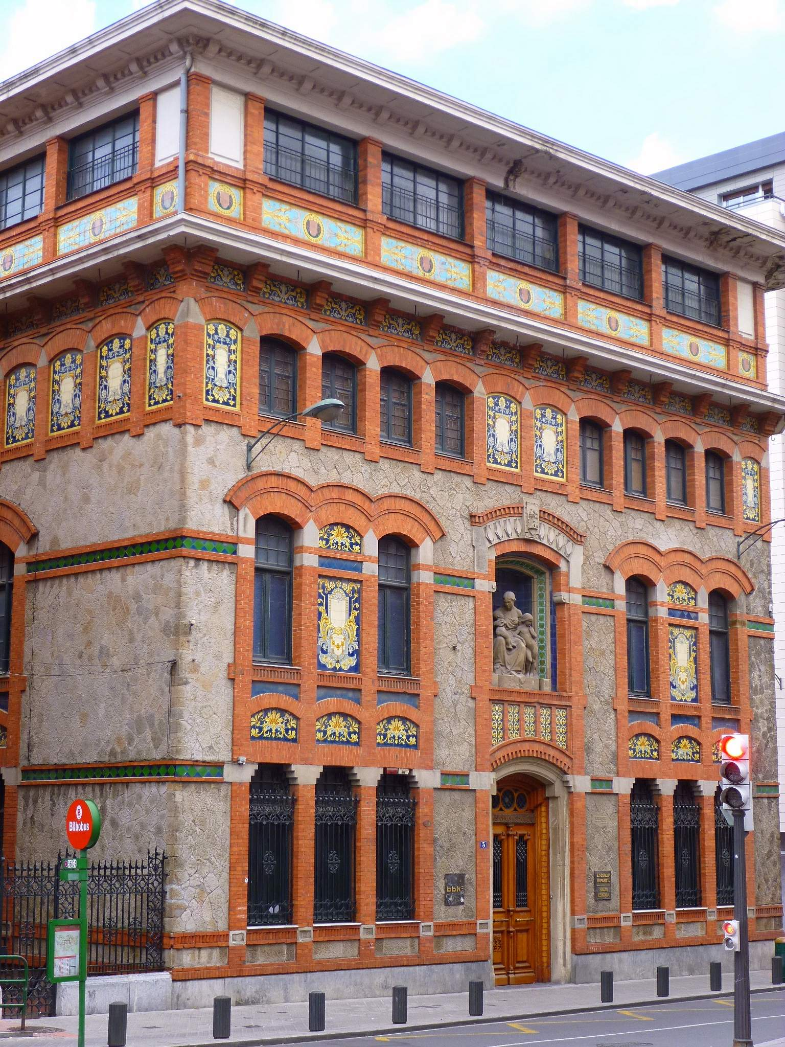 Casa cuna de Urazurrutia (Bilbao)